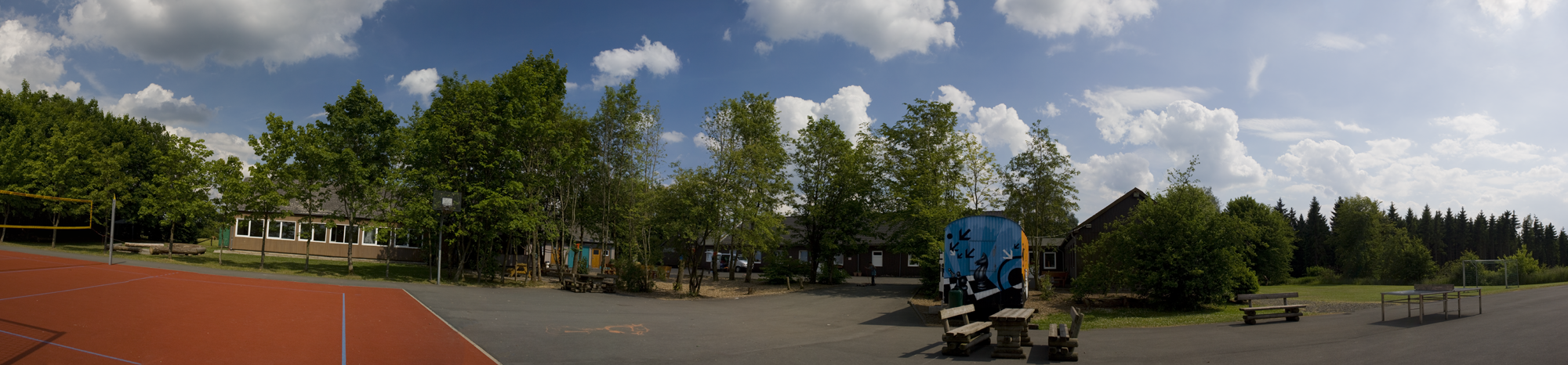 Panoramaansicht des Schulandheims Föckinghausen in Bestwig, gesehen vom Sportplatz